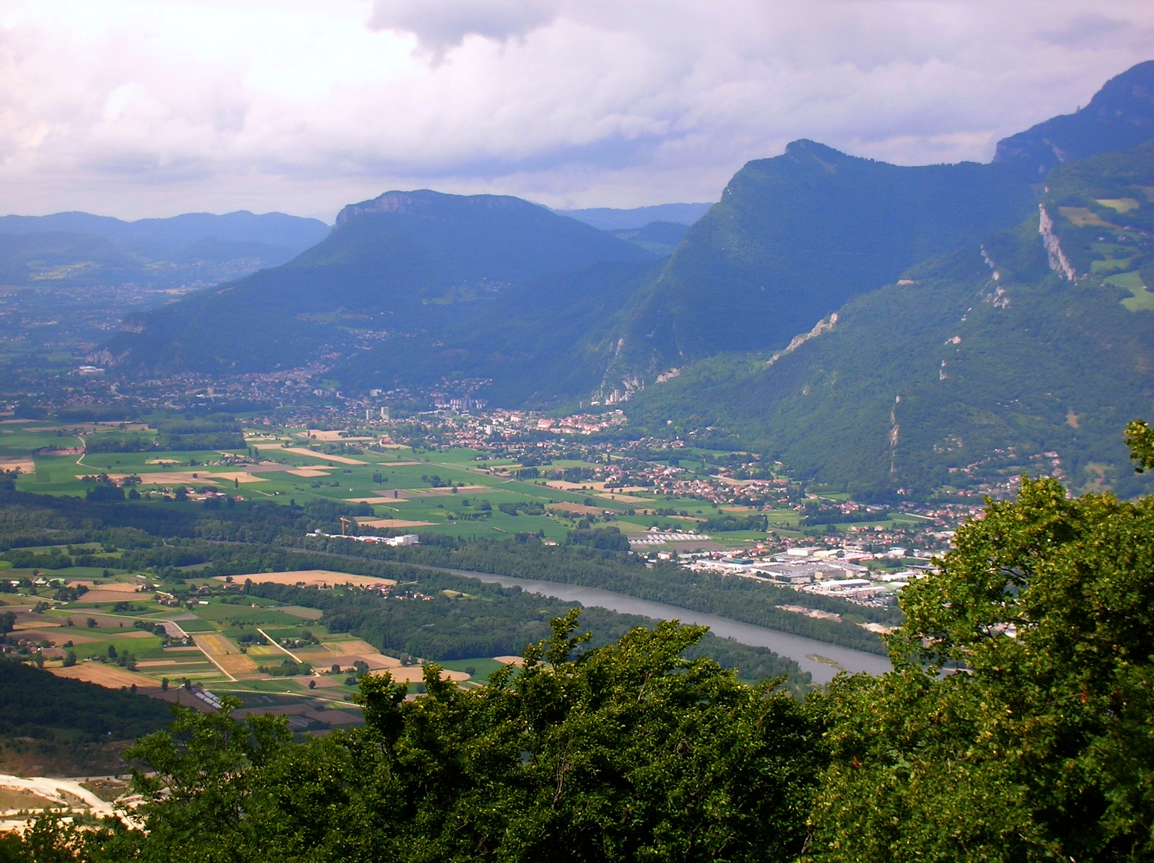 Panorama dalla Ferme Durant: Fontanil-Cornillon verso dx e Voreppe.